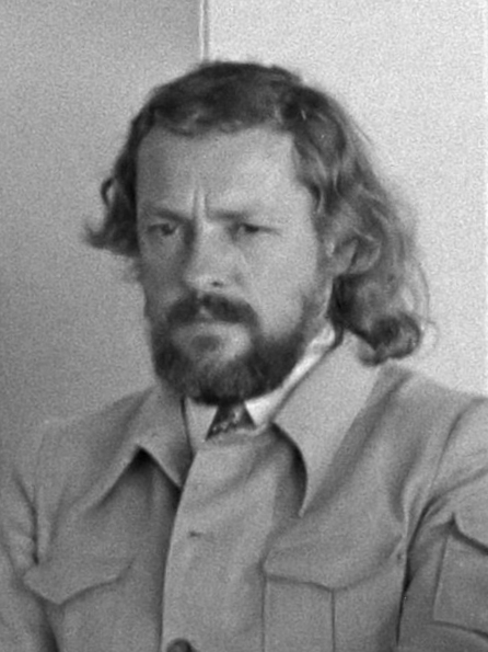 Prijs voor Kinderboek 1971 bekend gemaakt, Amsterdam, v.l.n.r. W. J. Schouten , Hugo Raes , D. Kok , D. Ouwehand 5 oktober 1971